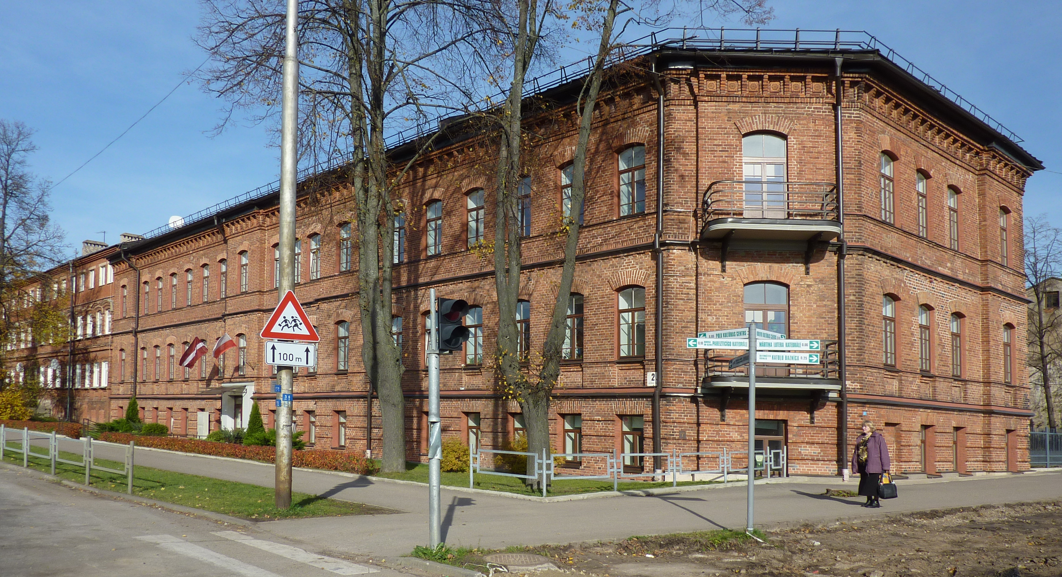 Gimnazjum Polskie im. J. Piłsudskiego w Daugavpils